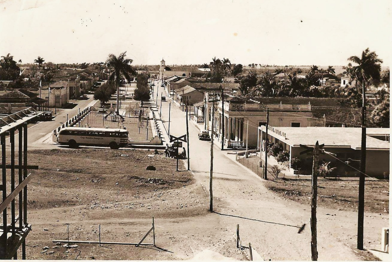 Rodas. Primera mitad del siglo XX